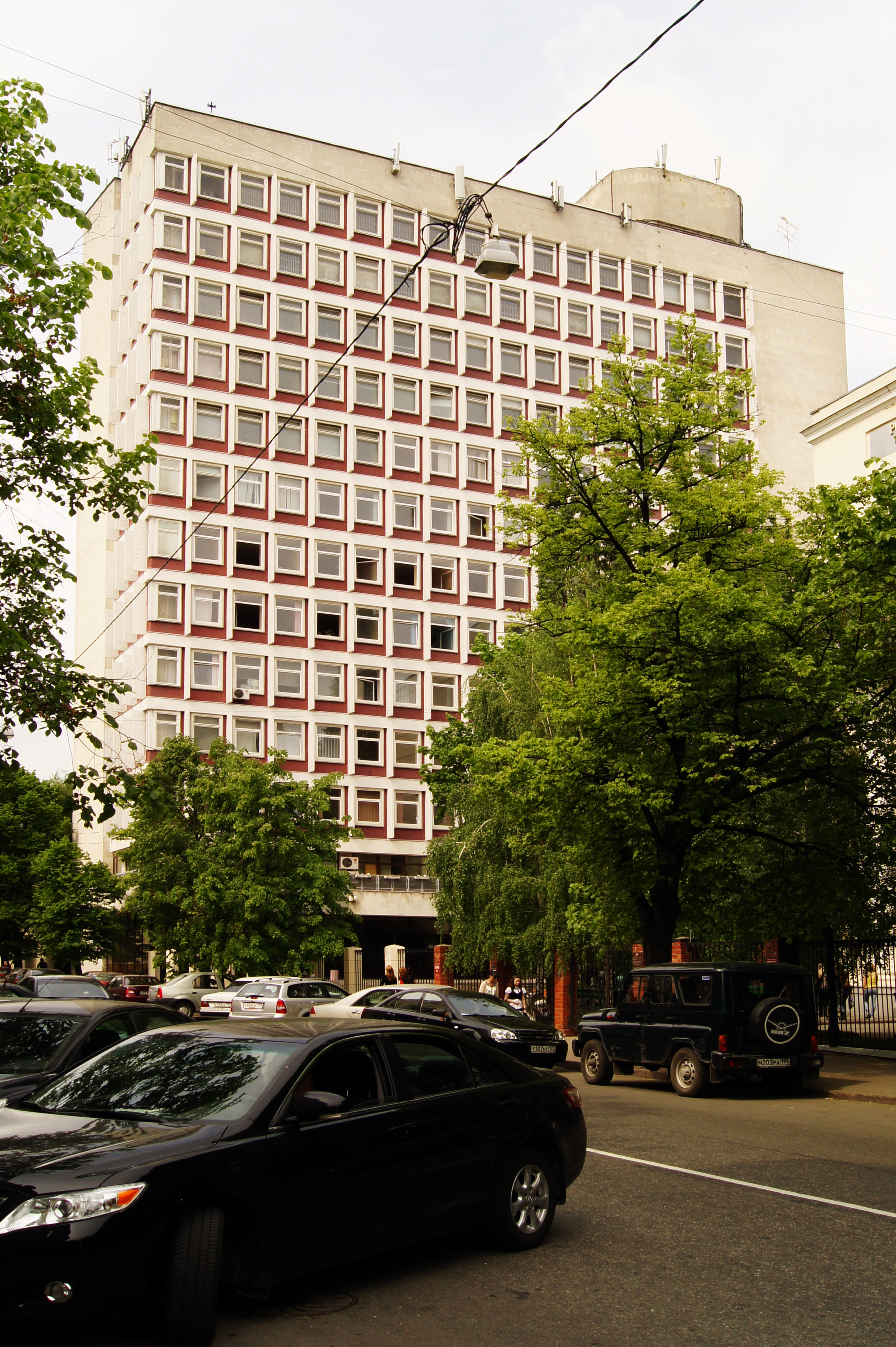 Povarskaya Street Moscow 38